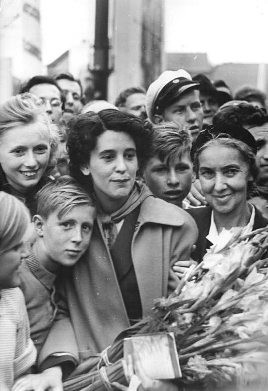 Berlin, III. Weltfestspiele, Eröffnungsfeier, Raymonde Dien ADN-ZB Sturm Schm-7.8.51-Die tapfere französische Friedenskämpferin Raymonde Dien in Berlin-Begeistert begrüssten die Freunde Raymonde Dien.